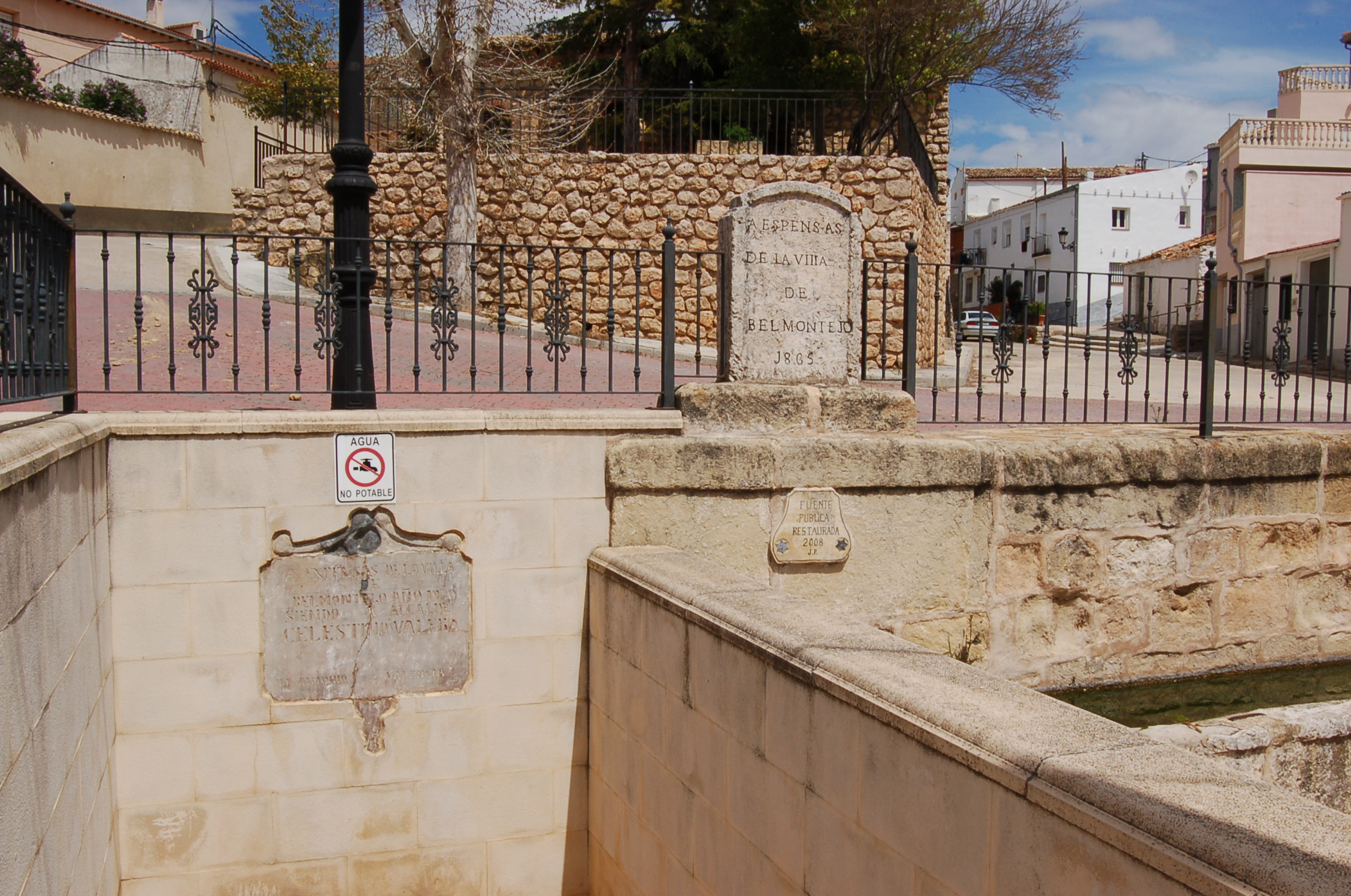 Fonte en Belmontejo